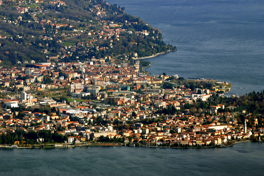 Veduta di Verbania dal Mottarone: in primo piano Pallanza, in secondo piano Intra.